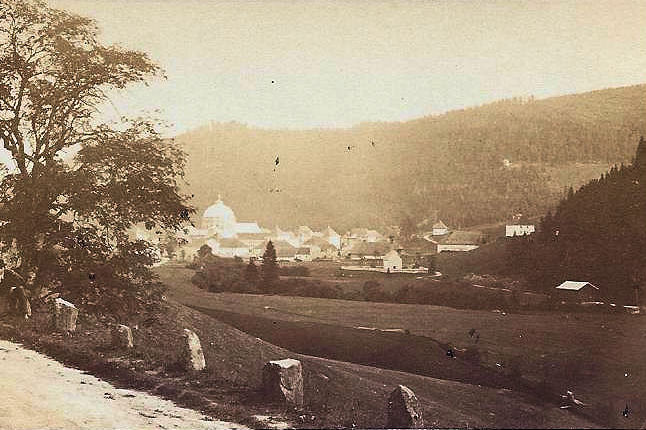 St. Blasien, von der Muchländerstraße aus im August 1867 aufgenommen. Albuminabzug des Atelier von Gottlieb Theodor Hase in Freiburg im Breisgau. Hase posiert im linken Bildrand